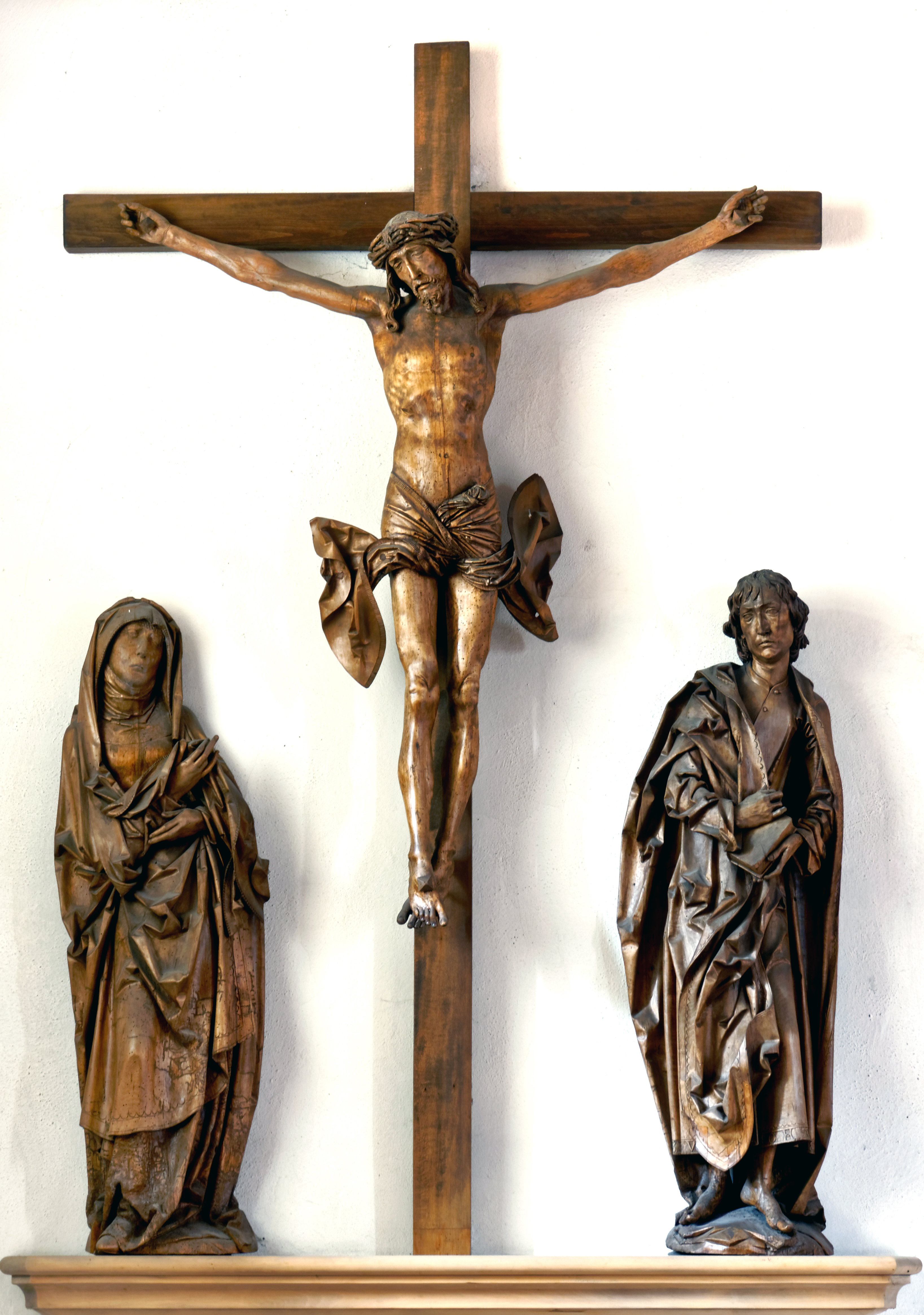 Die Triumphkreuzgruppe Tilman Riemenschneiders in der Stadtpfarrkirche Mariä Himmelfahrt Aub.